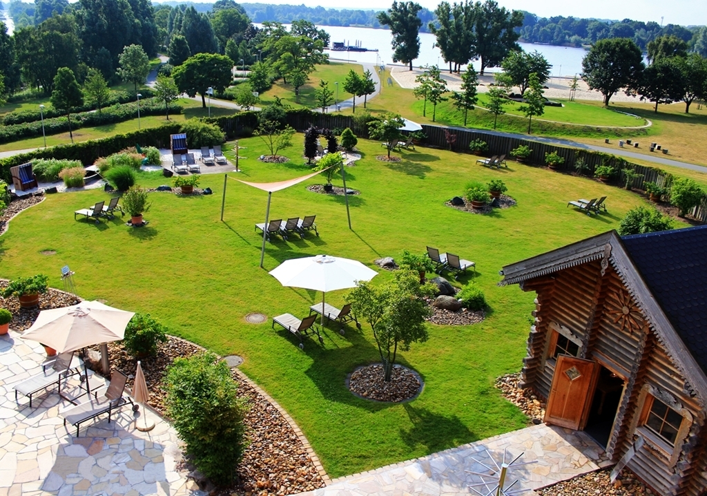 Deitsch: Außenbereich